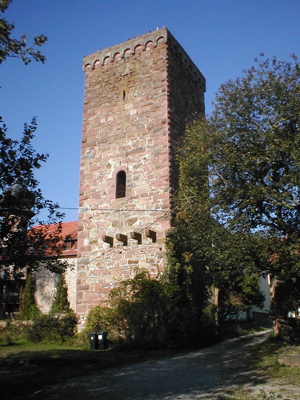 Torturm (datiert 1413, evtl. älterer Burgfried) des Schlosses in Mosbach-Lohrbach, Baden-Württemberg, Deutschland